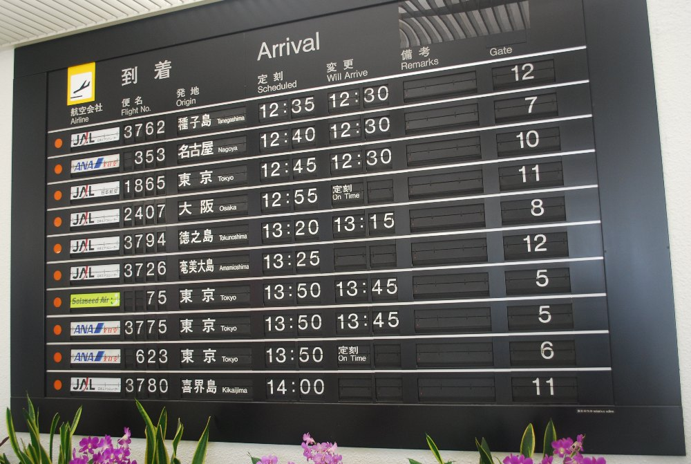 反転フラップ式案内表示機。鹿児島空港。霧島市。